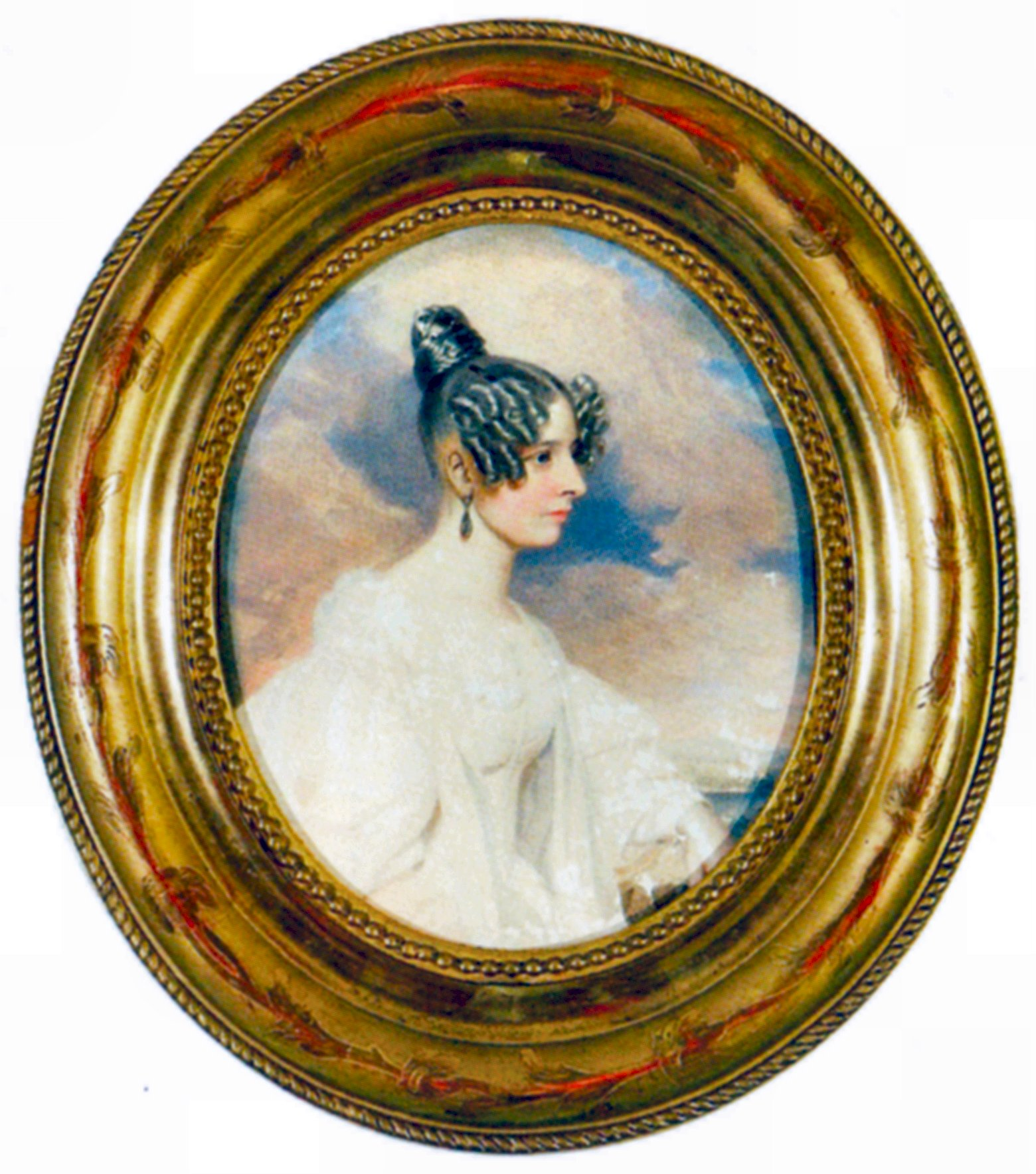 Margarethe Gräfin von Bigot de St. Quentin, vermählt mit Karl Freiherr Ransonnet von Villez